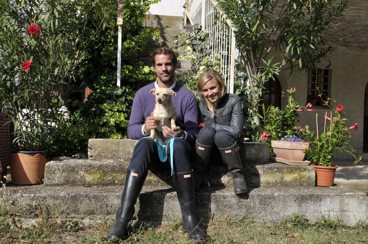 Drömmen om Italien